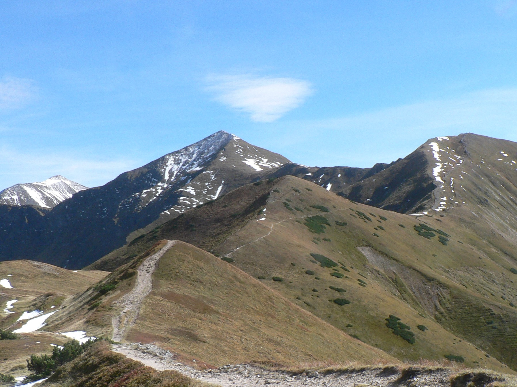 Bystra, Starorobociański Wierch i Kończysty Wierch z Trzydniowiańskiego Wierchu